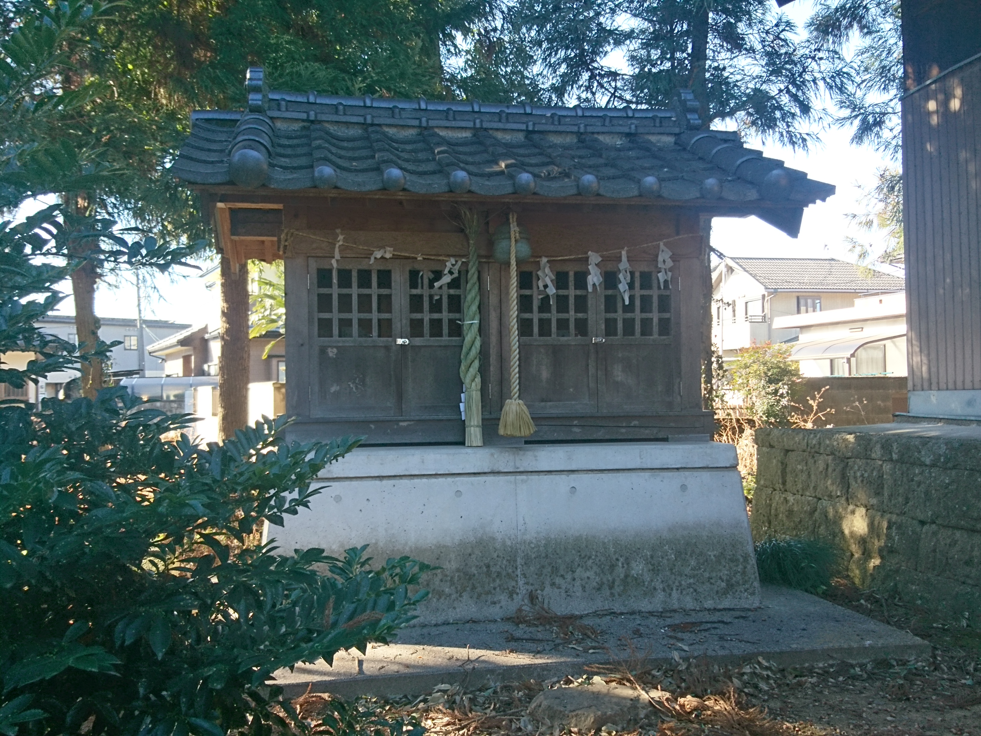 栃木市大平町西野田にある西野田雷電神社の境内社・大杉神社。